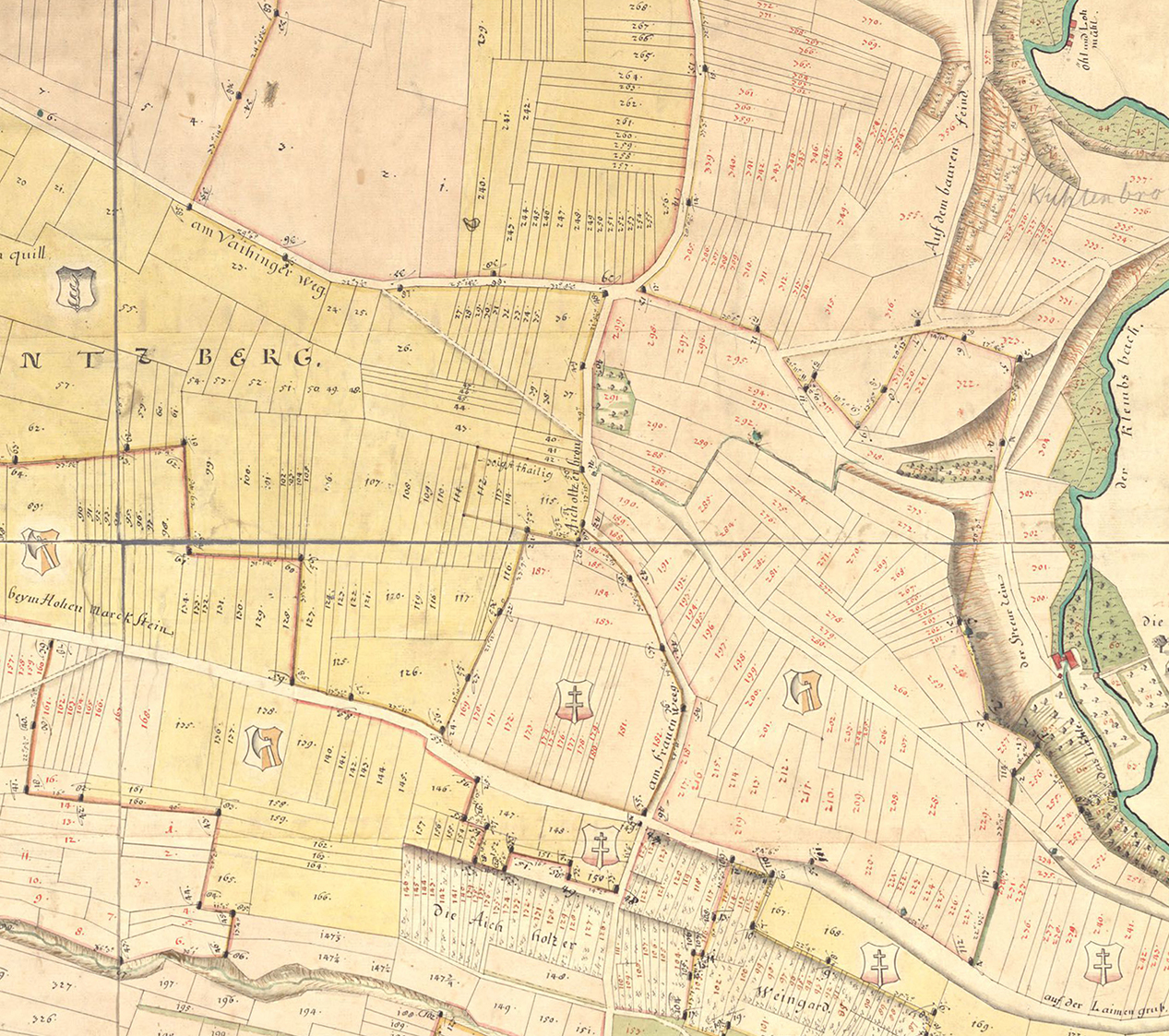 Wüstung Aichholzhof beim "Aicholzer Bronn" auf der Markgröninger "Außfeldkarte" von 1752. Das Gelände des ehemaligen Hofes ist weitestgehend dem Kirchenheiligen abgabepflichtig. Angrenzend Markungsteile der württembergischen Kellerei und des Markgröninger Spitals.